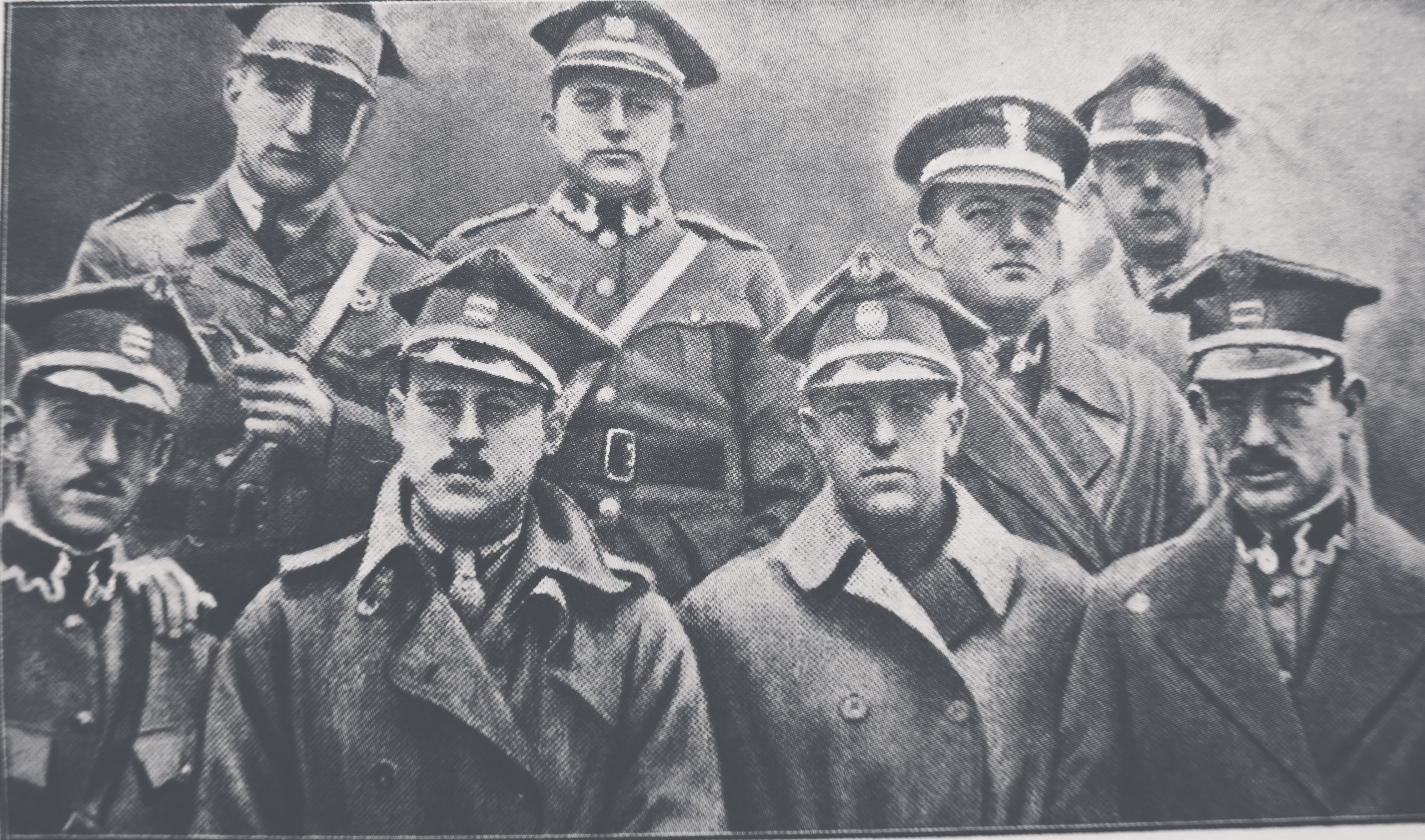 Pierwsi ochotnicy amerykańscy w 7-ej eskadrze myśliwskiej im. Tadeusza Kościuszki: mjr Cedric E. Fauntleroy, kpt. Merian C. Cooper, kpt. Edward Corsi, por. George M. Crawford, por. Kenneth O. Shrewsbury, por. Carl H. Clark, por. H.C. Rorison, por. E. Noble